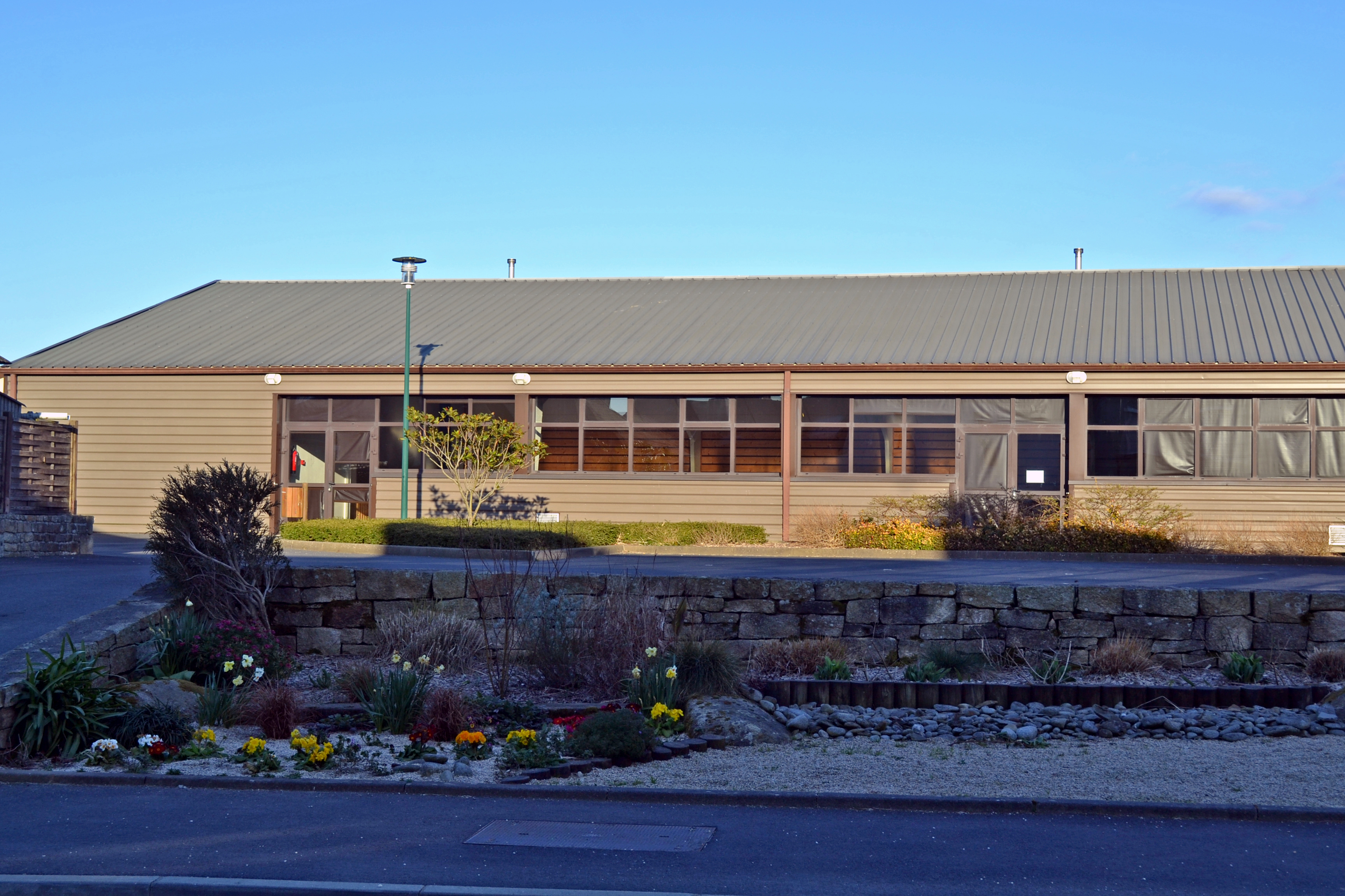 Salle polyvalente de Mespaul (Finistère) construite en 2013.